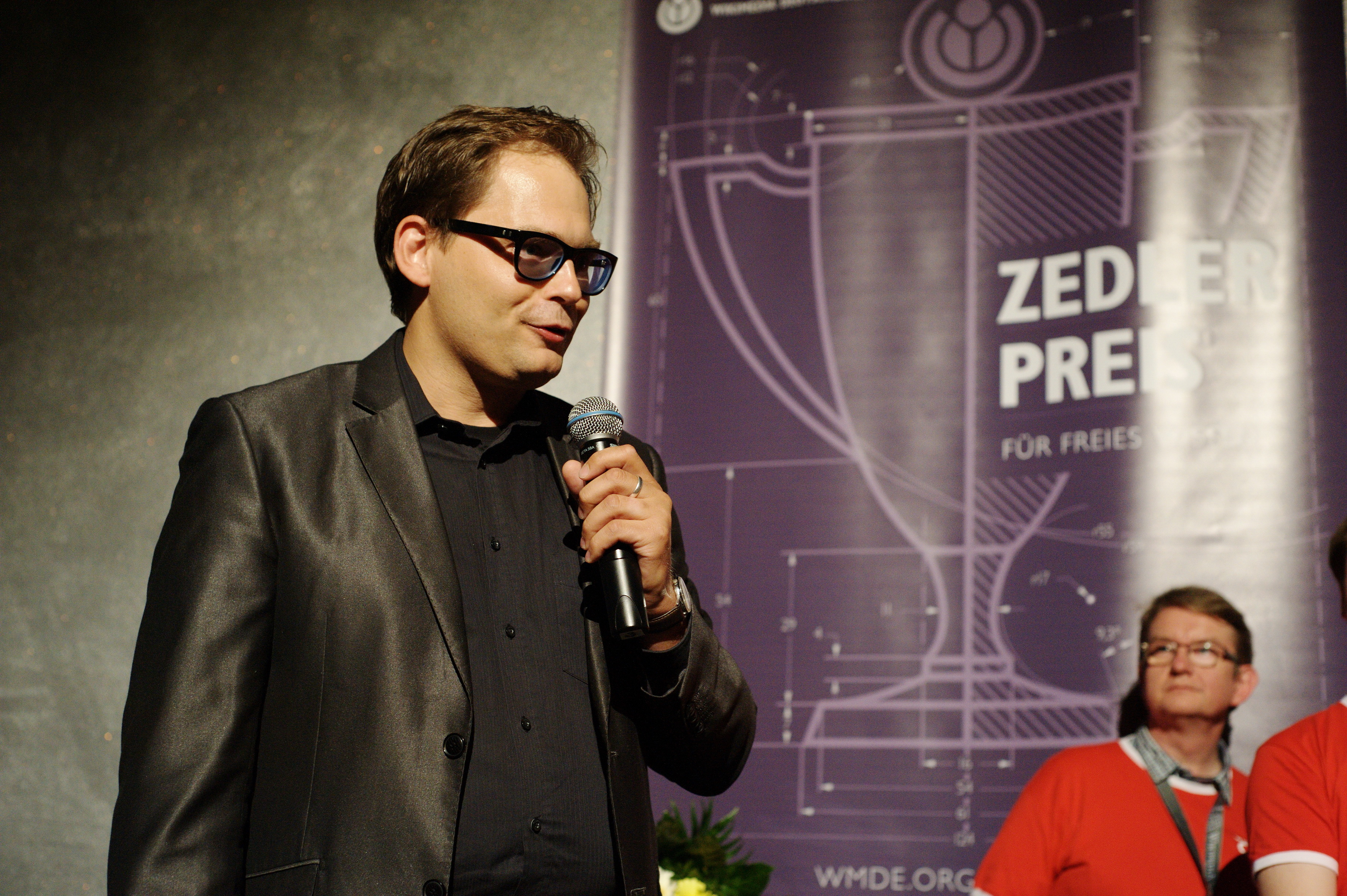 Verleihung Zedler-Preis 2013